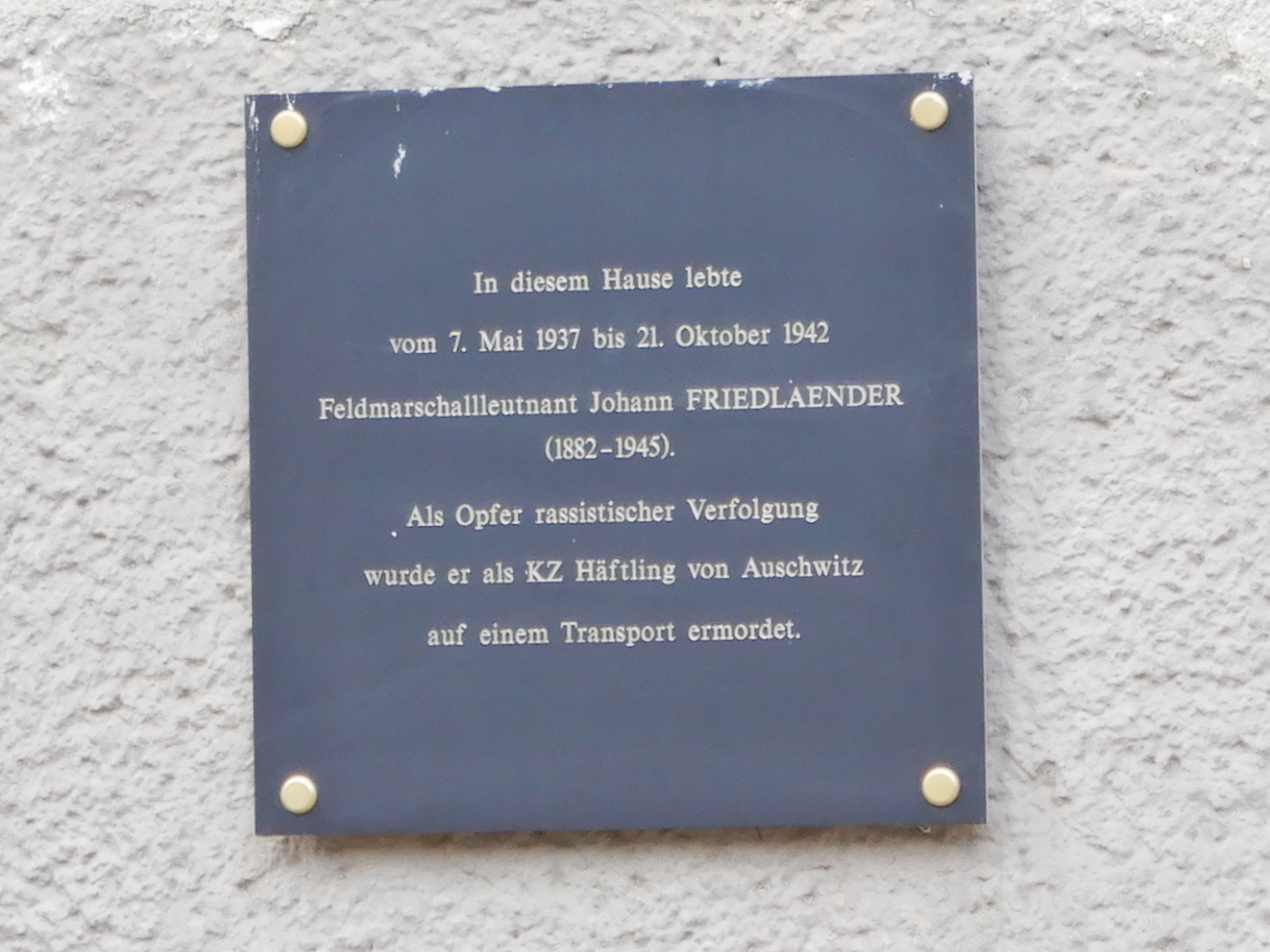 Gedenktafel für NS-Opfer (Wien, Wenzgasse 19, Johann Friedländer)